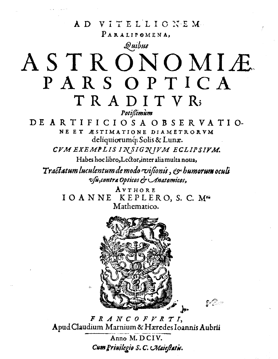 Ad Vitellionem paralipomena, quibus astronomiae pars optica traditur; potissimum de artificiosa obseruatione et aestimatione diametrorum deliquiorumque solis & lunae. Cum exemplis insignium eclipsium. Habes hoc libro, lector, inter alia multa noua, tractatum luculentum de modo visionis& humorum oculi vsu, contra opticos & anatomicos, authore Ioanne Keplero .... - Francofurti : apud Claudium Marnium & haeredes Ioannis Aubrii, 1604. - [16], 449, [19] p., [2] c. di tav. ripiegate : ill. ; 4º . Frontespizio